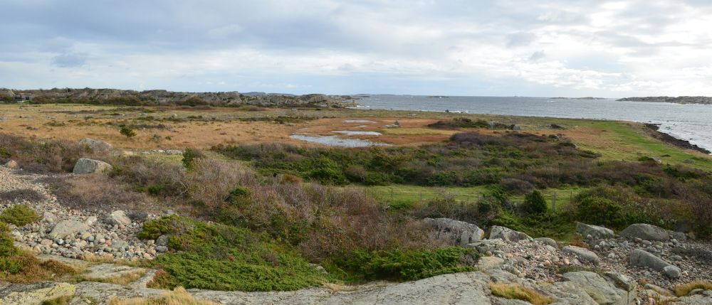 Pirane dekker flere vegetasjonstyper, fra sjøen i sør til krattvegetasjonen innerst i reservatet.